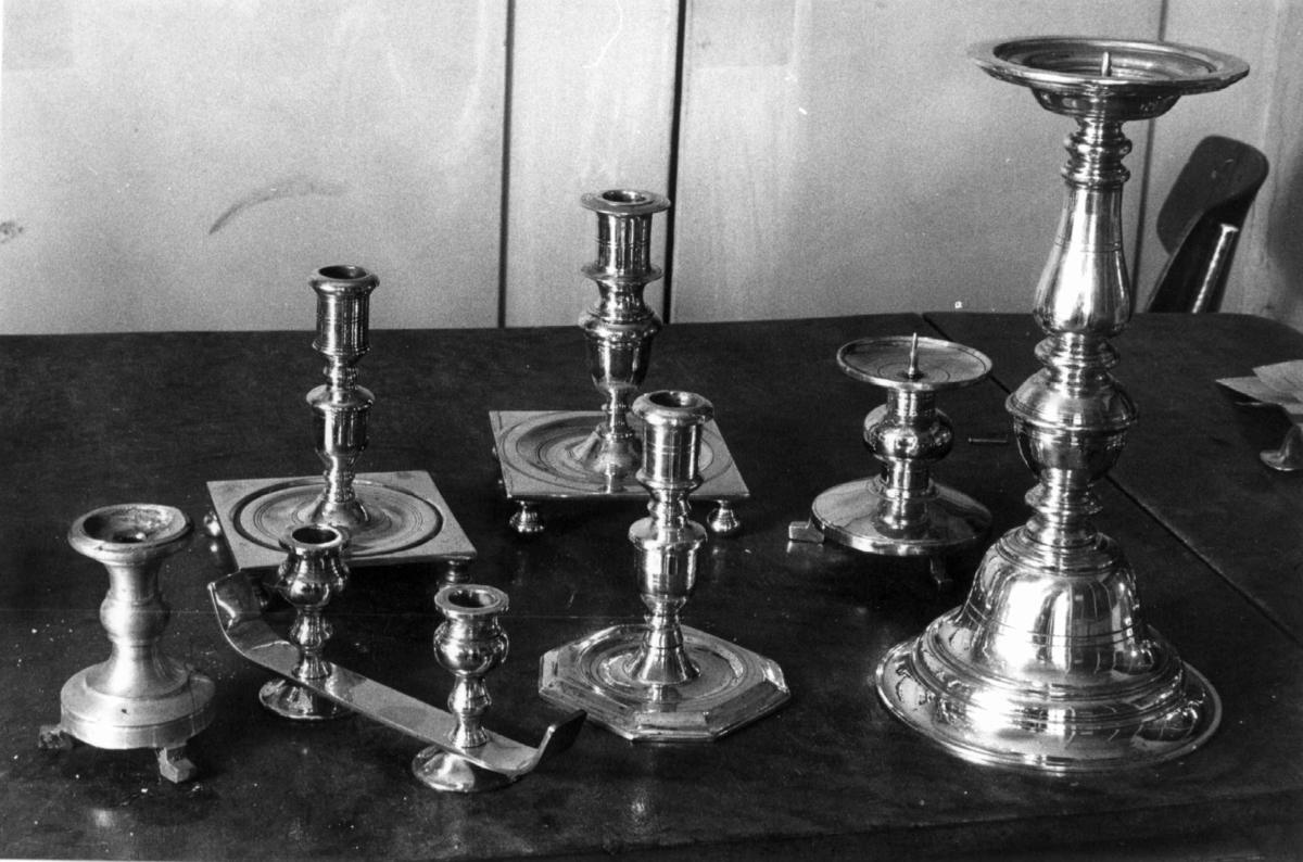 Lysestaker fra C. P. Larsen. Foto Norsk Folkemuseum.